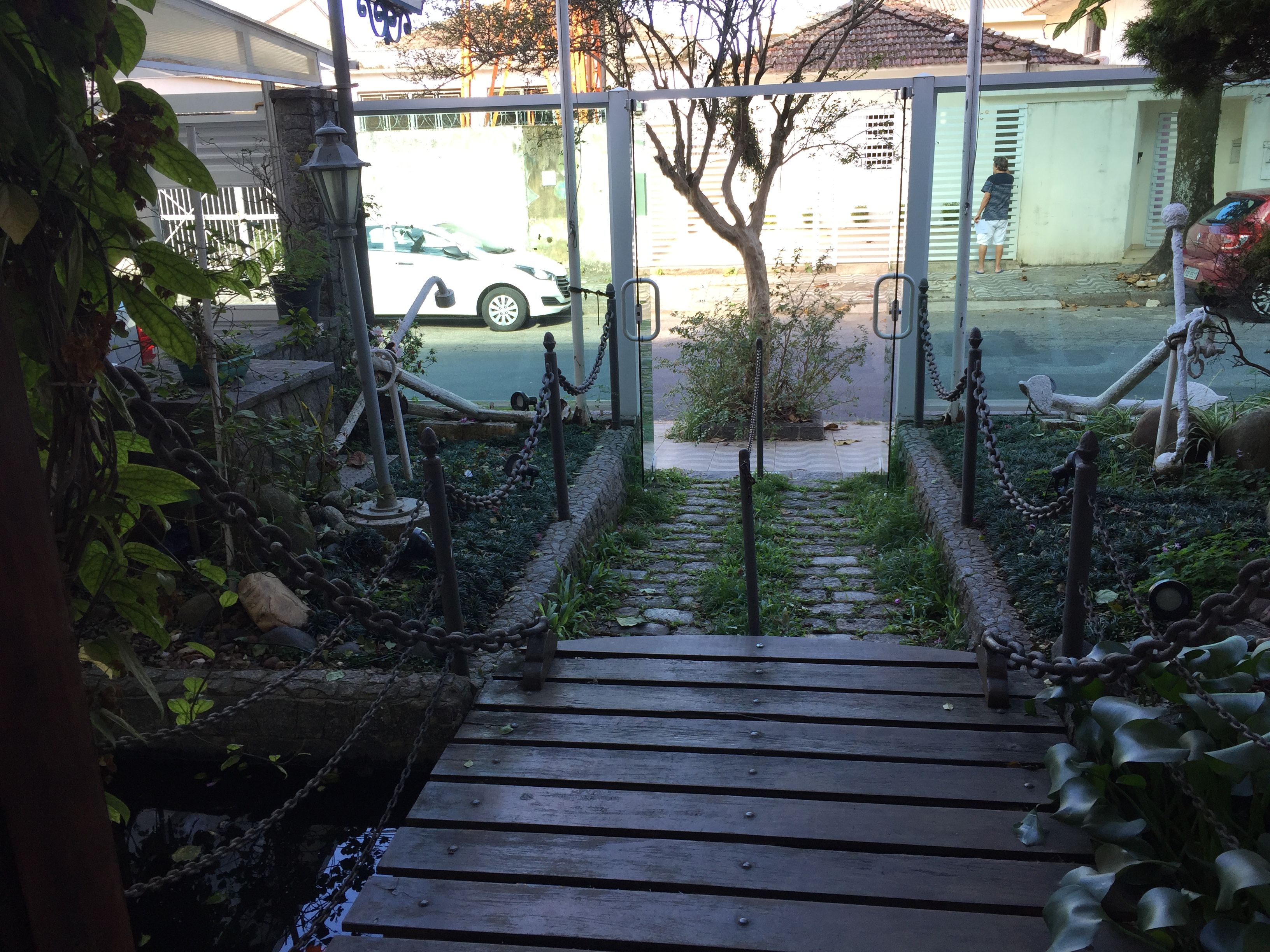 Vista do jardim do Museu do Mar (Santos)